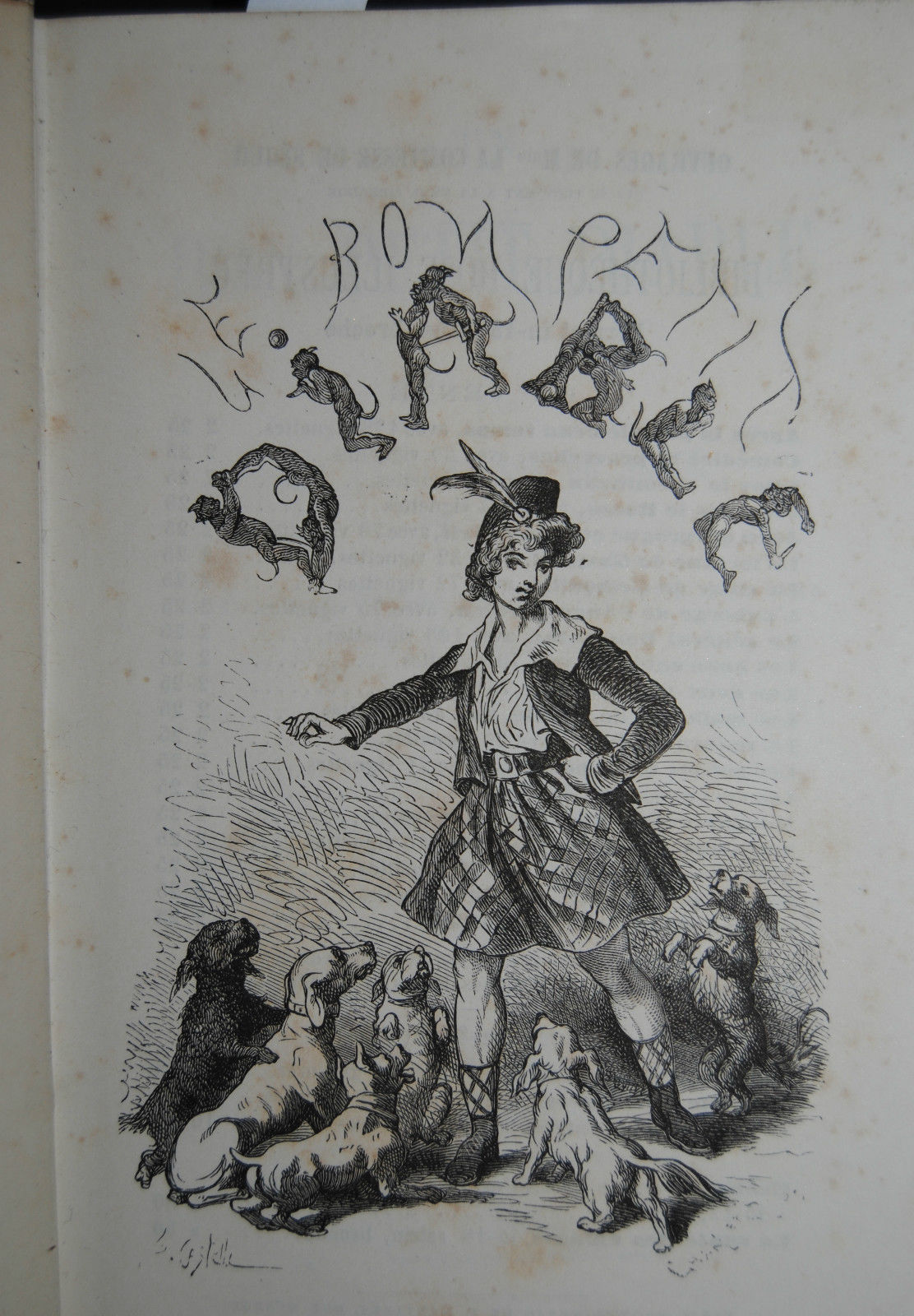 Comtesse de Ségur, Un bon petit diable, illustration d'Horace Castelli.